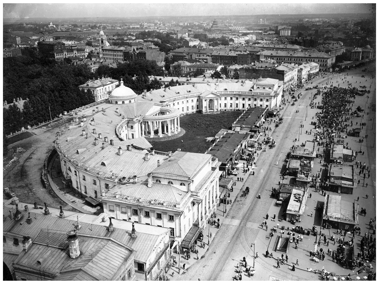 Вид в сторону трёх вокзалов